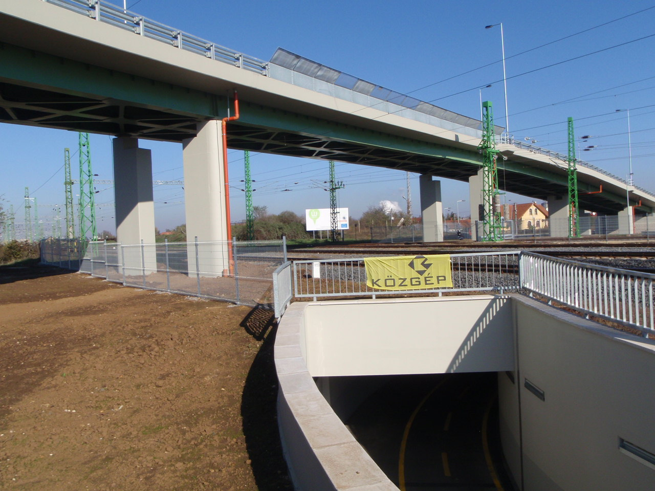 Szombathely, a 2012.10.18-án elkészült Csaba utcai felül- és aluljáró